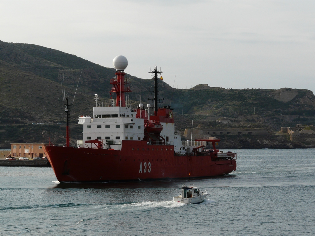 Buque de Investigación Oceanográfica de la Armada Española Hespérides (A-33)